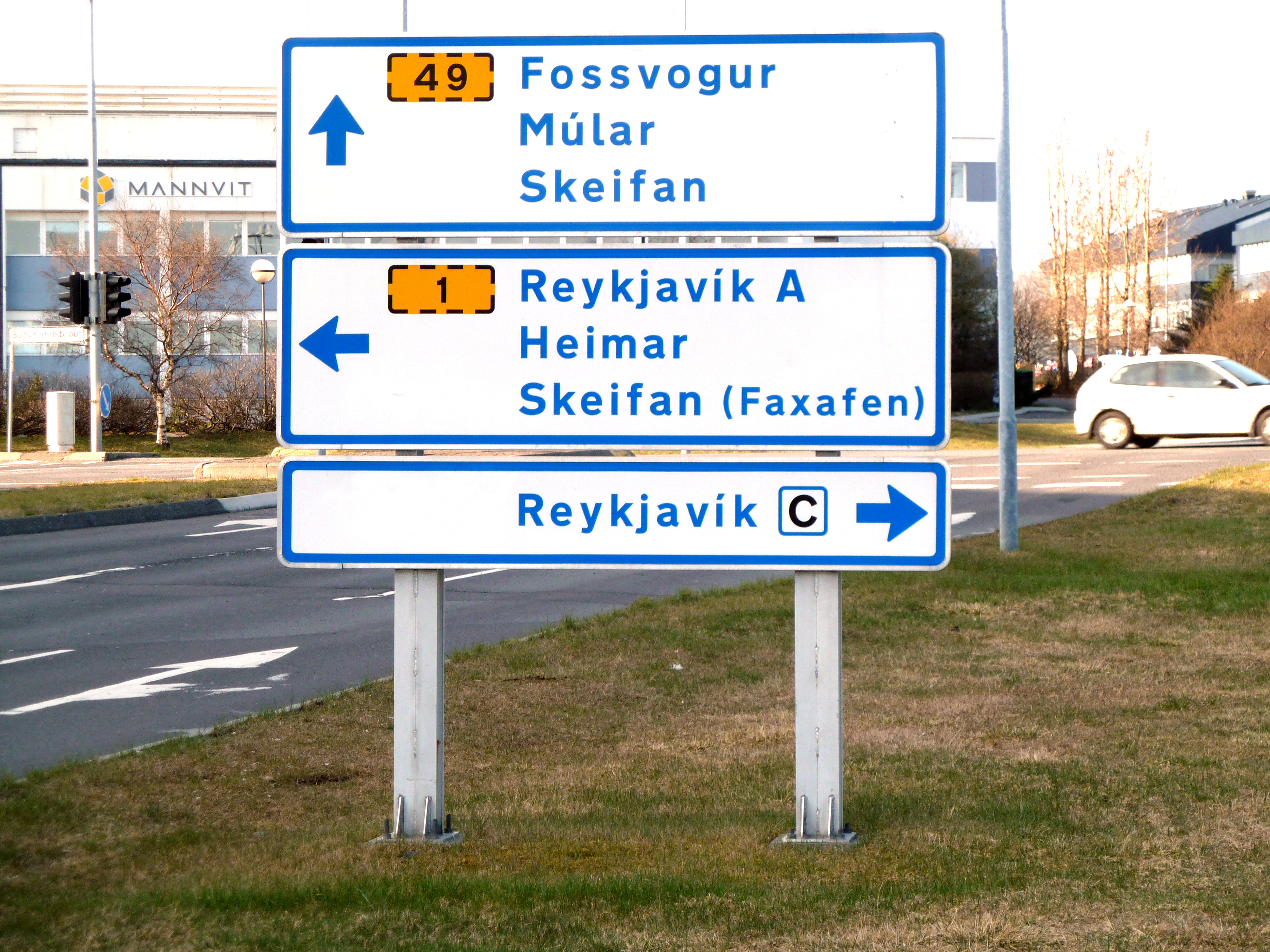 Reykjavík Road Sign